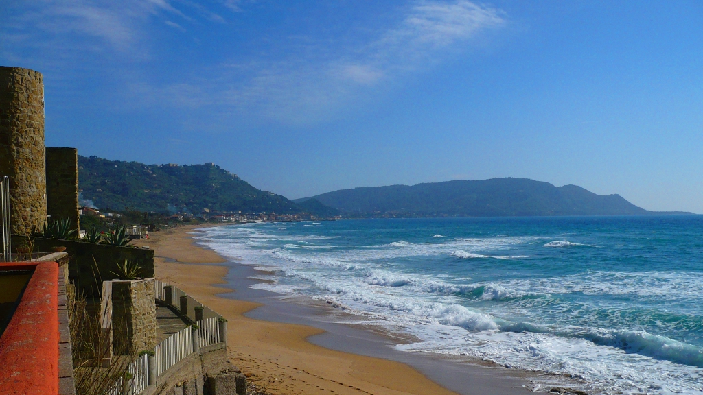 Il golfo di Castellabate da Punta Pagliorola di Tresino a Punta Licosa